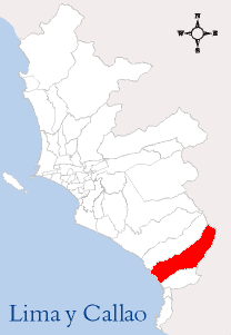 Localización del Distrito de Punta Negra